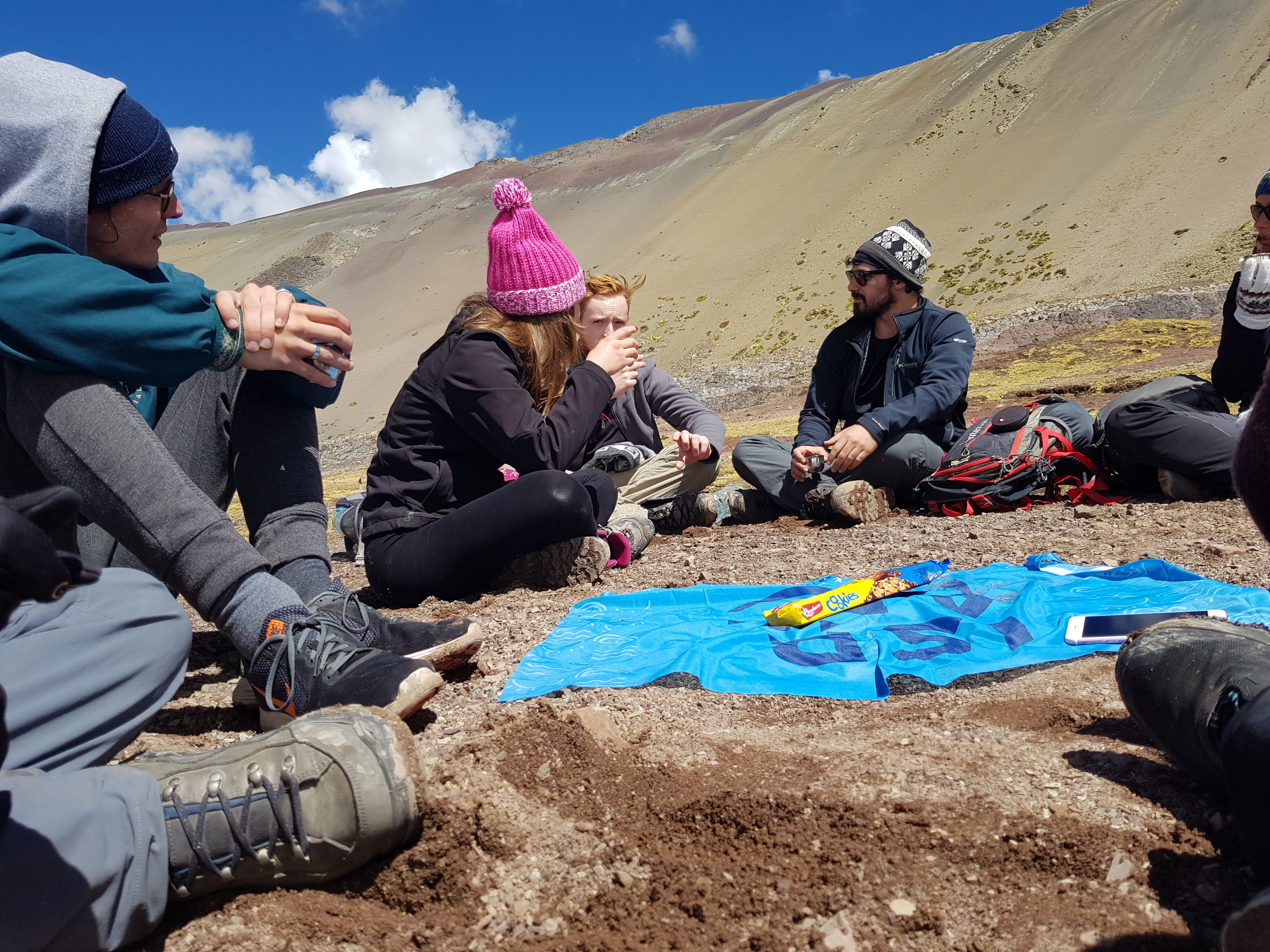 פעלות חברתית בפרו